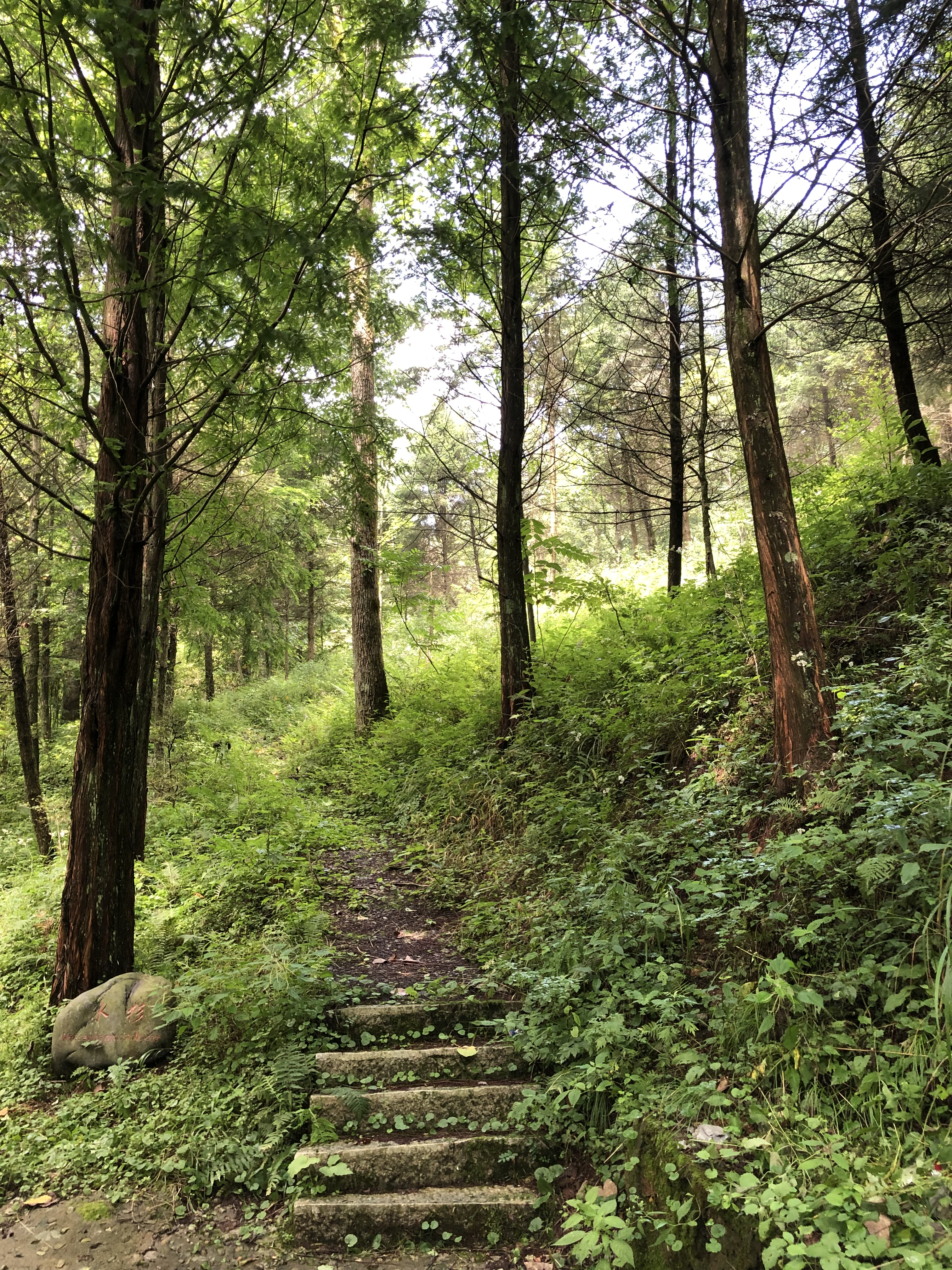 中文（中国大陆）: 大老岭植物园，位于湖北省宜昌市夷陵区与兴山县、秭归县交界处的大老岭国家级森林公园。